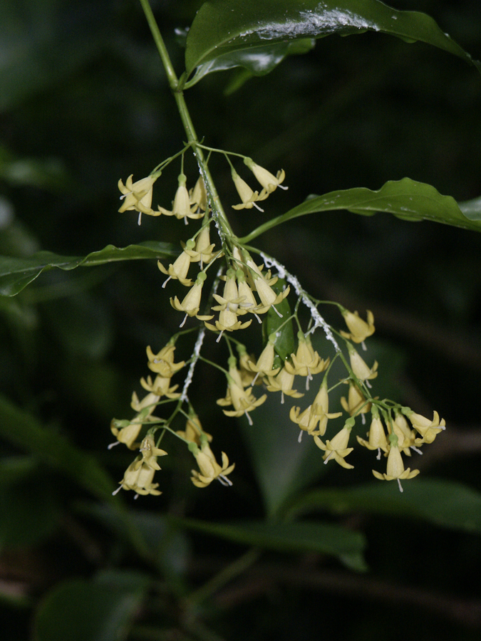 Chiococca alba, Barbados